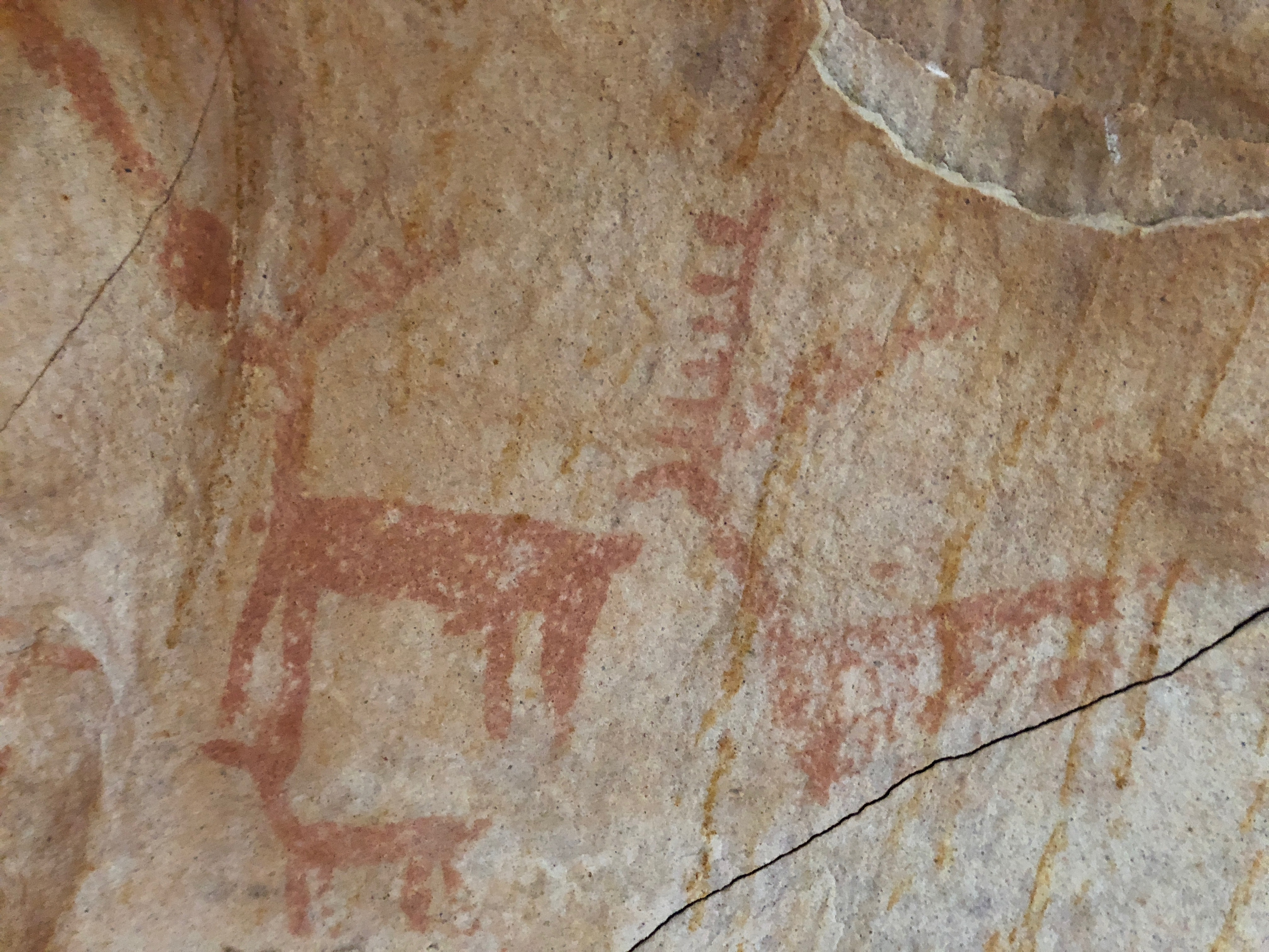 Los Alcornocales This is a photography of a Site of Community Importance in Spain with the ID: ES0000049. Natura2000 entry, EEA entry